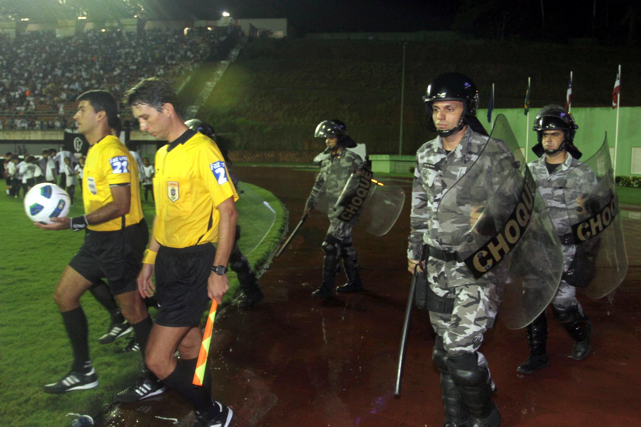 Ein Fußballschiedsrichter-Gespann betritt unter Polizeischutz das Spielfeld eines brasilianisches Stadions.